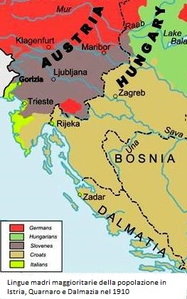 Questo File è stato ricavato (estrazione dettaglio) da un’altra immagine in archivio – File:Austria Hungary ethnic.svg